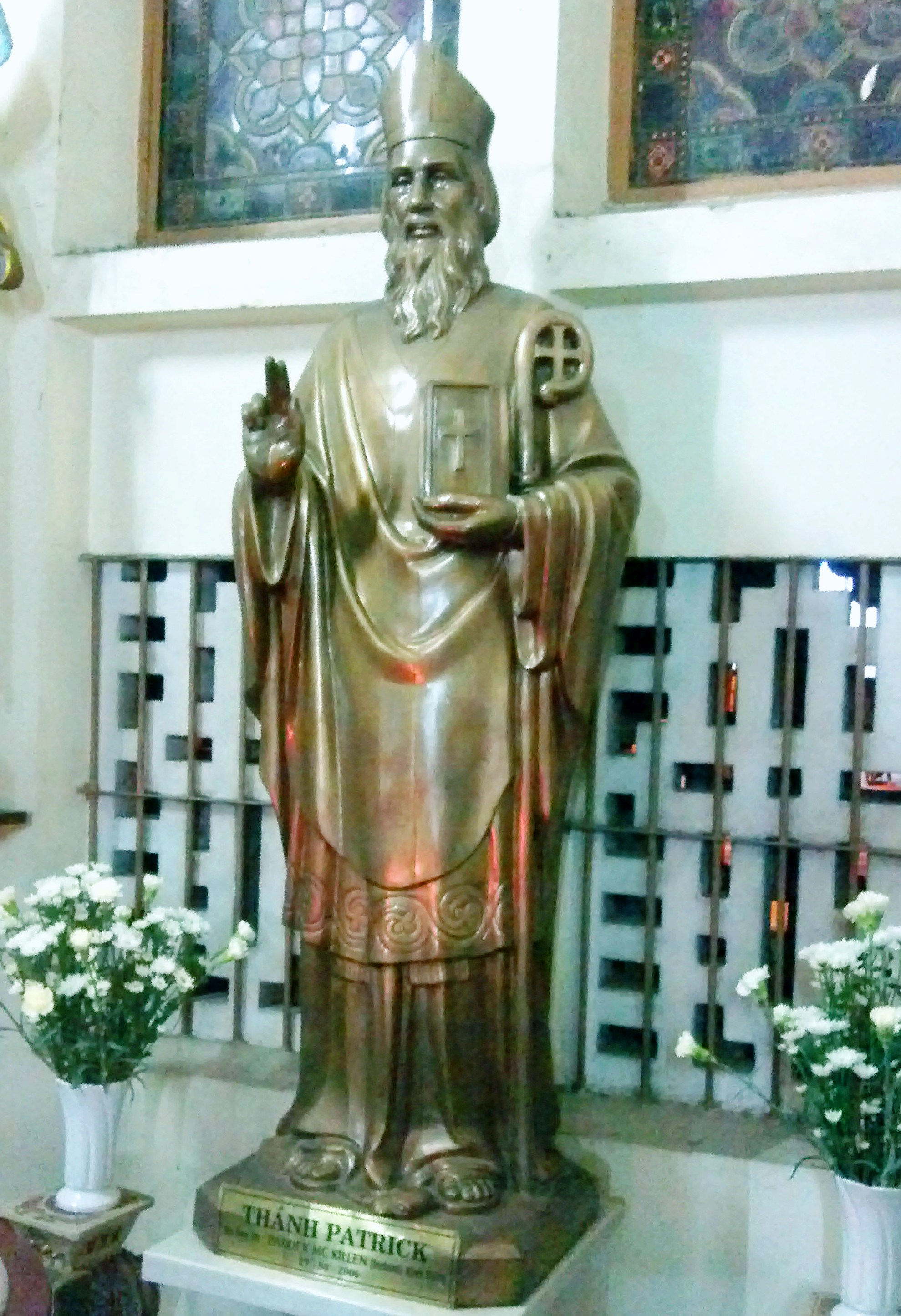 Tượng đồng thánh Patrick tại nhà thờ Đức Bà Sài Gòn.